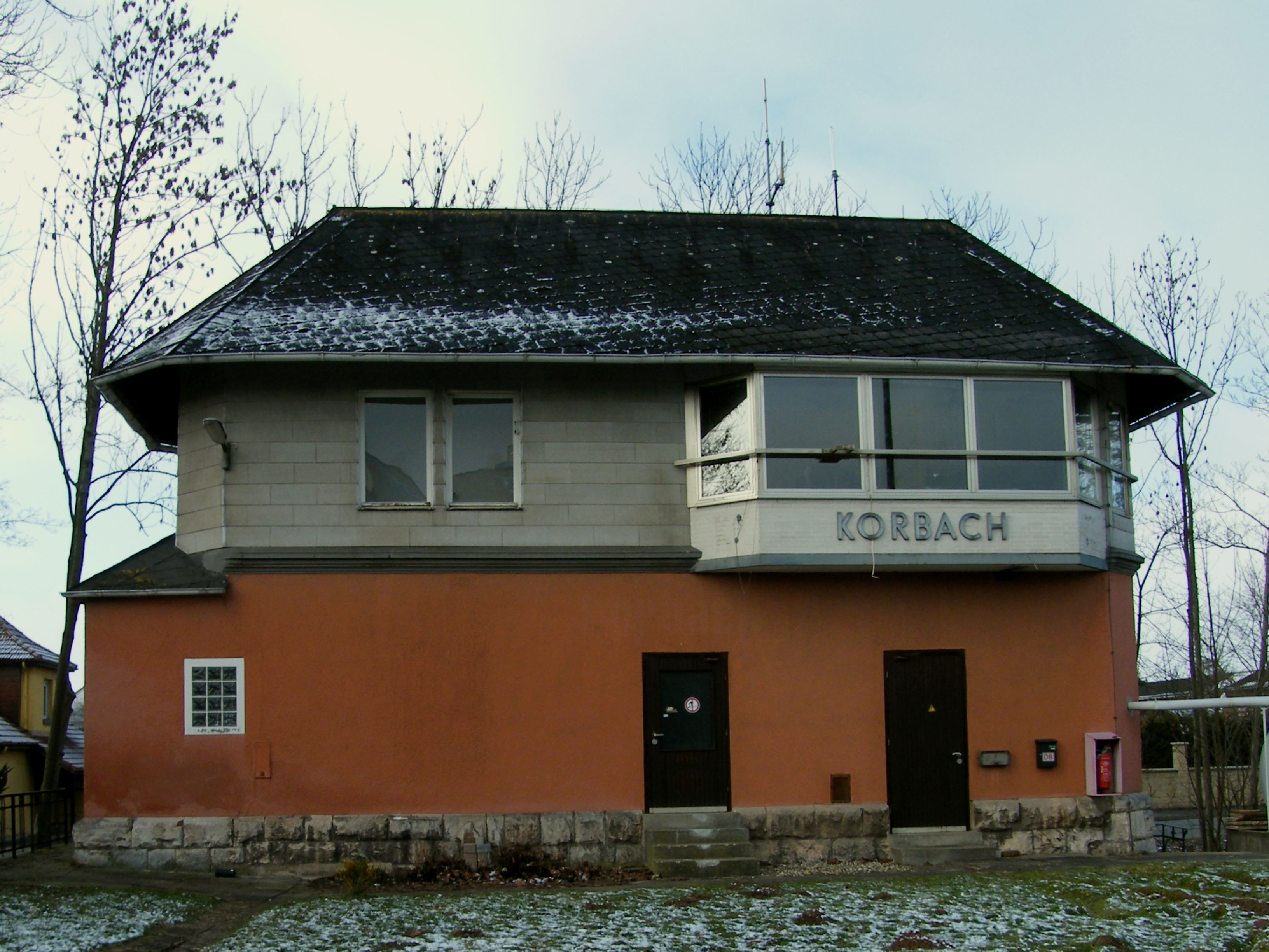 Stellwerk Bahnhof Korbach (Gleisseite)